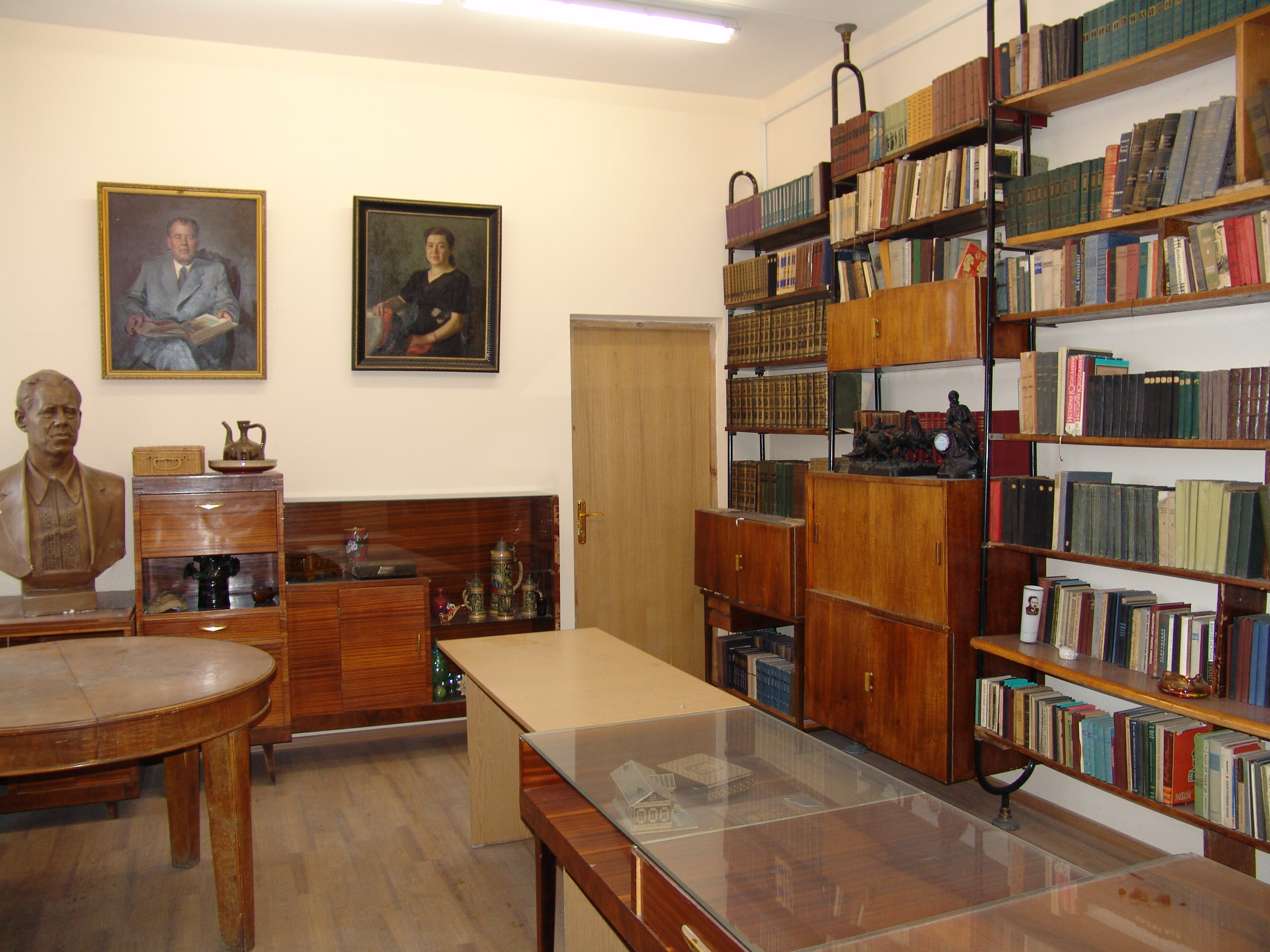 Мемориальный кабинет Петра Глебки находится в Центральной научной библиотеке им. Я. Коласа НАН Беларуси